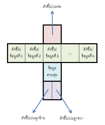 โครงสร้างปมของต้นไม้แบบที